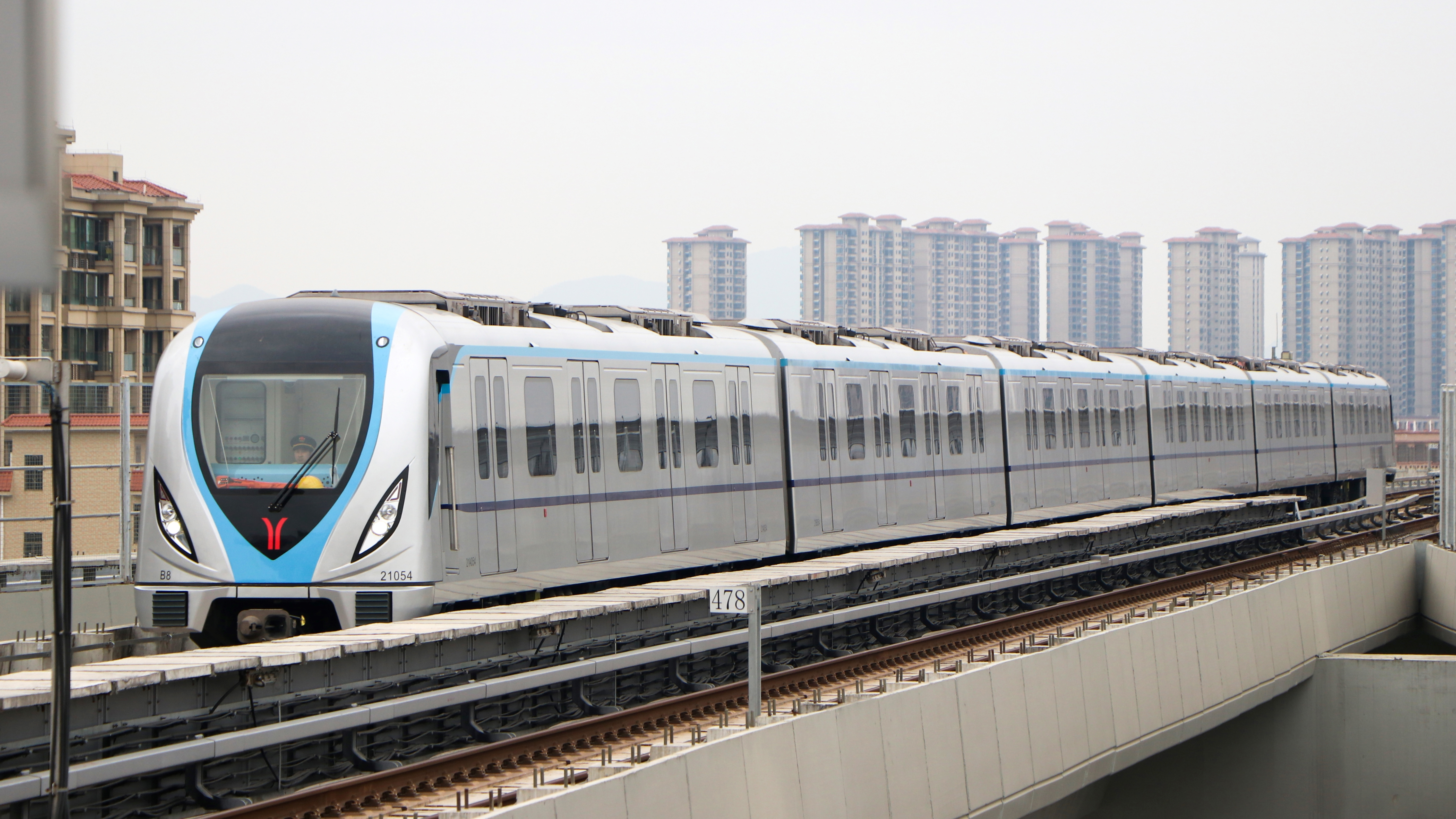 广州地铁21号线列车（21-5354）即将抵达朱村站